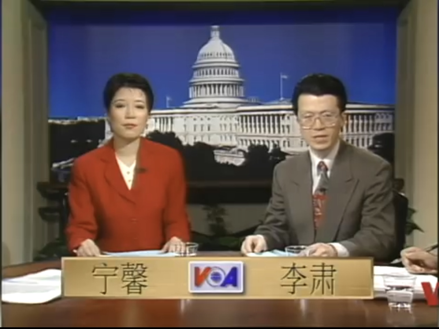 VOA 卫视开播首日的画面